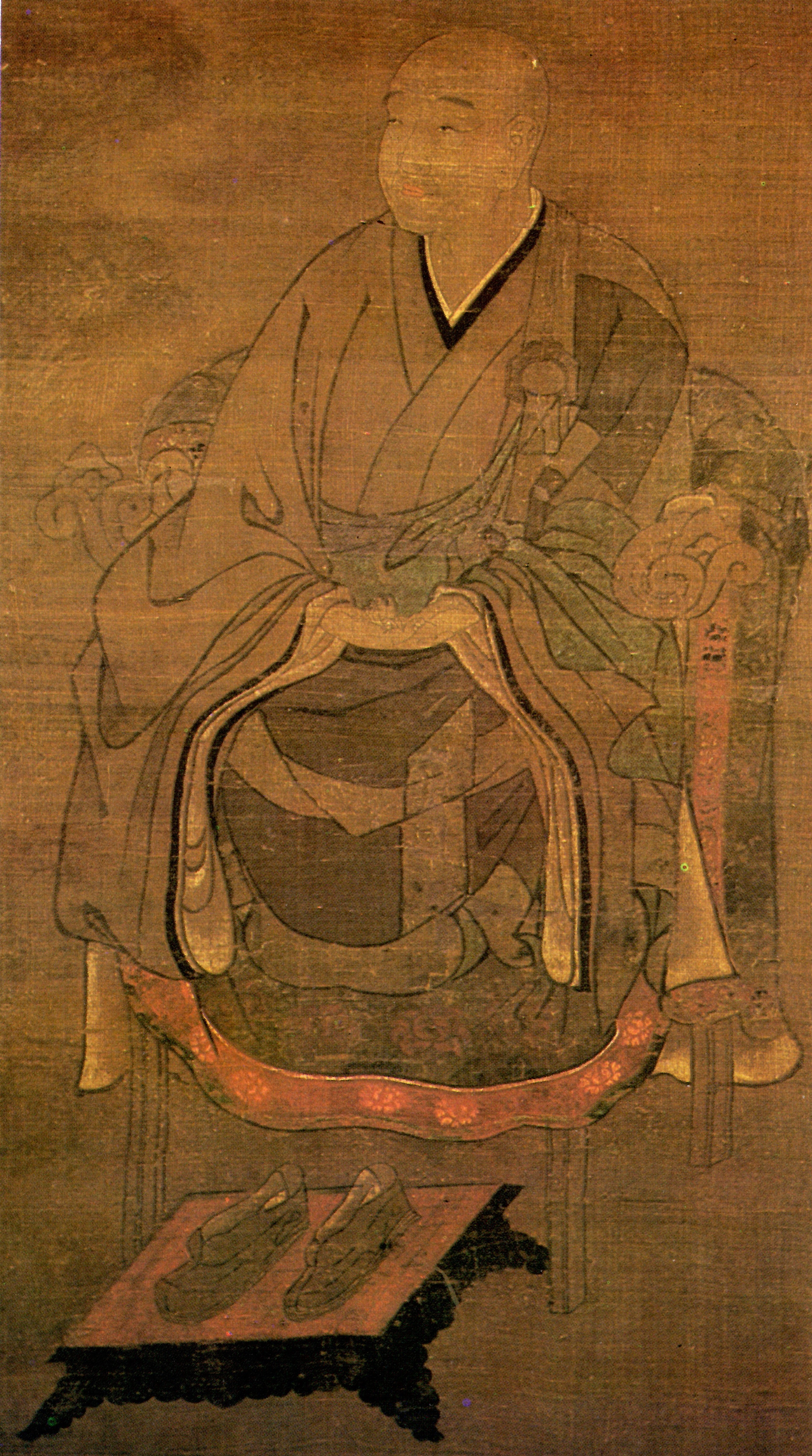 北条時定(時氏の子)の肖像。